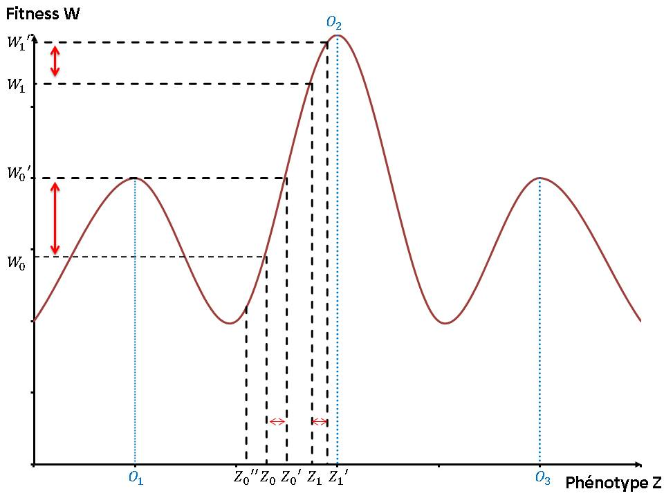 On a un graphique de la fitness en fonction du phénotype. Les phénotypes résidents Z0 et Z1 subissent une mutation et on a apparition de phénotypes mutants Z0', Z0 et Z1'.